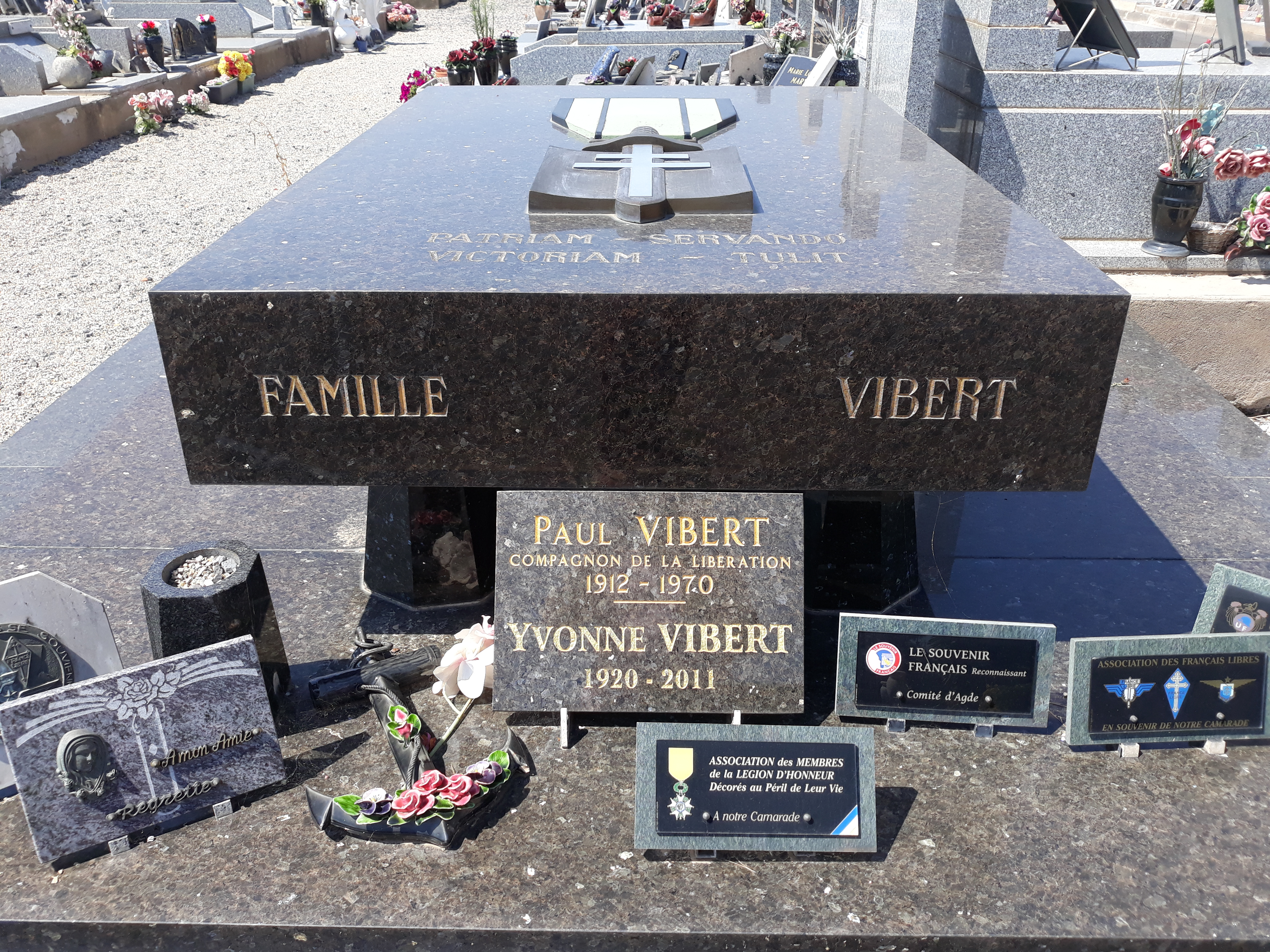 Das Grab des französischen Marineoffiziers Paul Laurent Vibert auf dem Friedhof von Agde (Hérault).